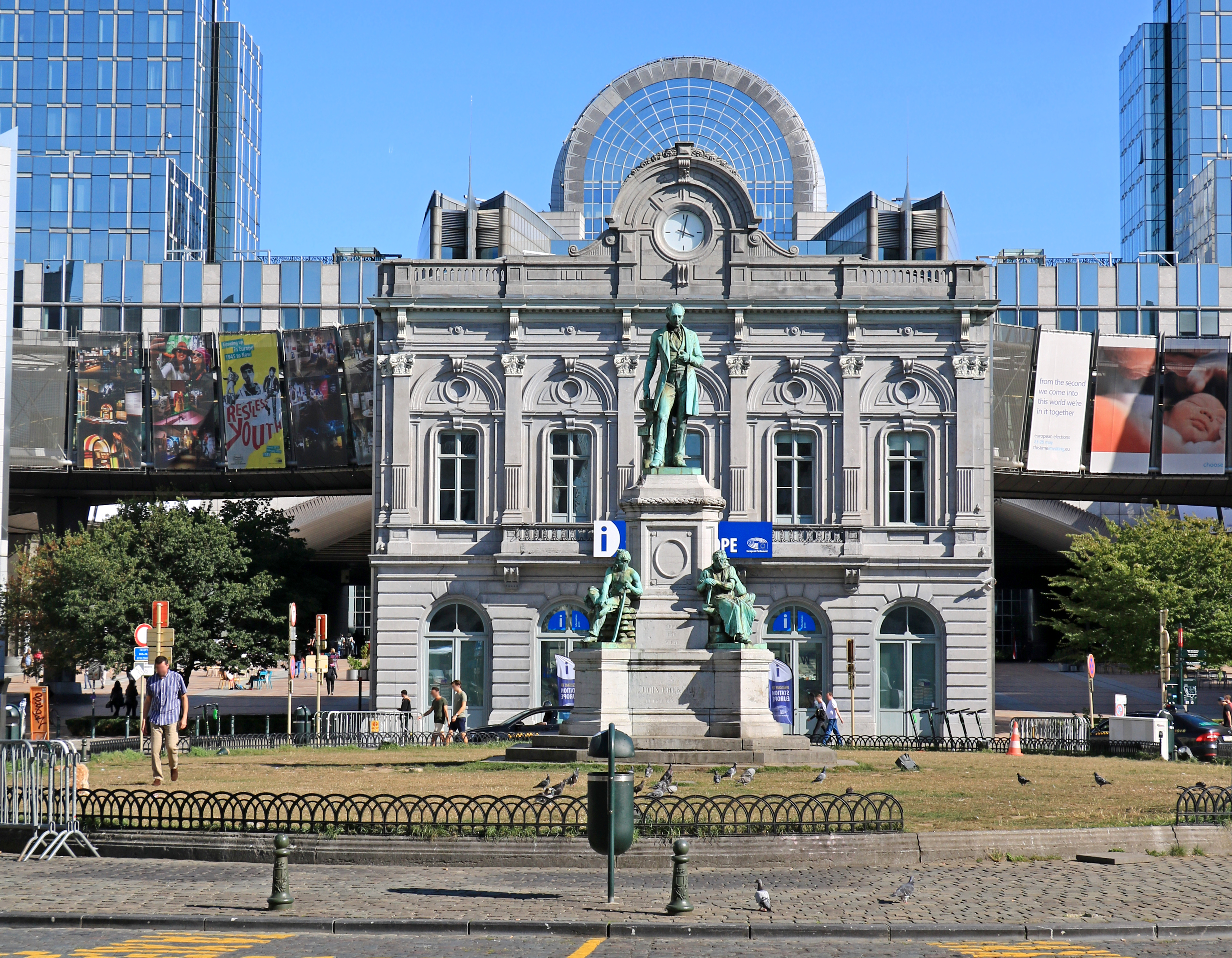 Belgique - Bruxelles - Ixelles - Place du Luxembourg - Monument à John Cockerill (1872) This photo of immovable heritage has been taken in the Brussels Capital Region